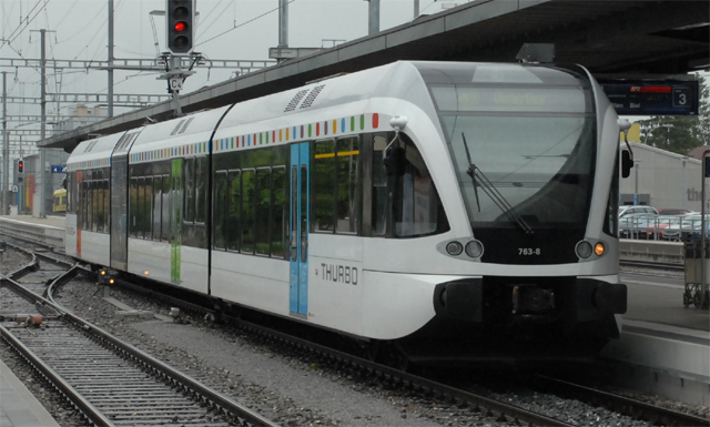 GTW 763-8, Thurbo op 23 juni 2009 te Weinfelden